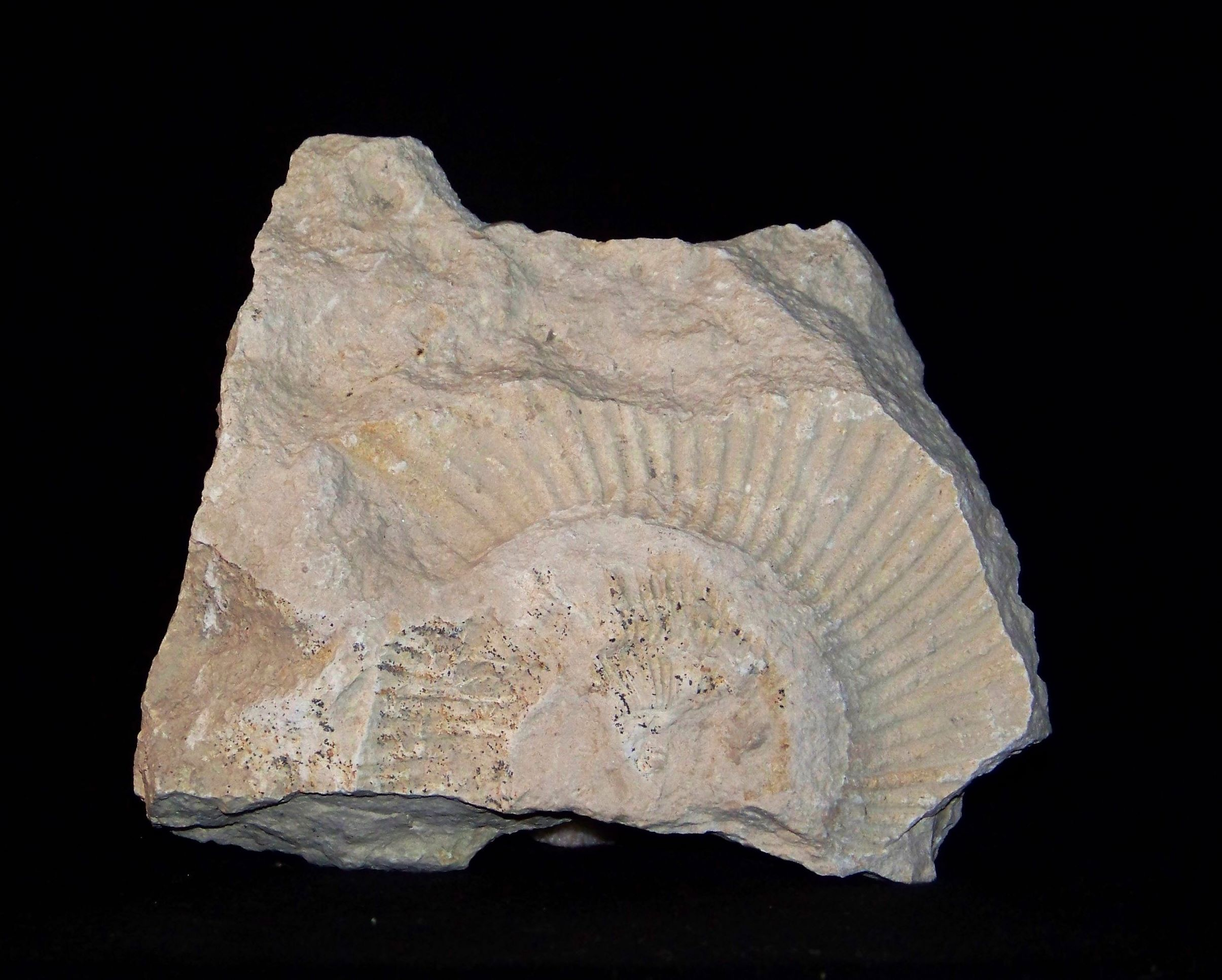 Wapień kalkarenitowy z odciskiem amonita (Perisphinctes sp.), Jura (oksford), k. Wysoka, Wysoka, Jura Krak-Częst.